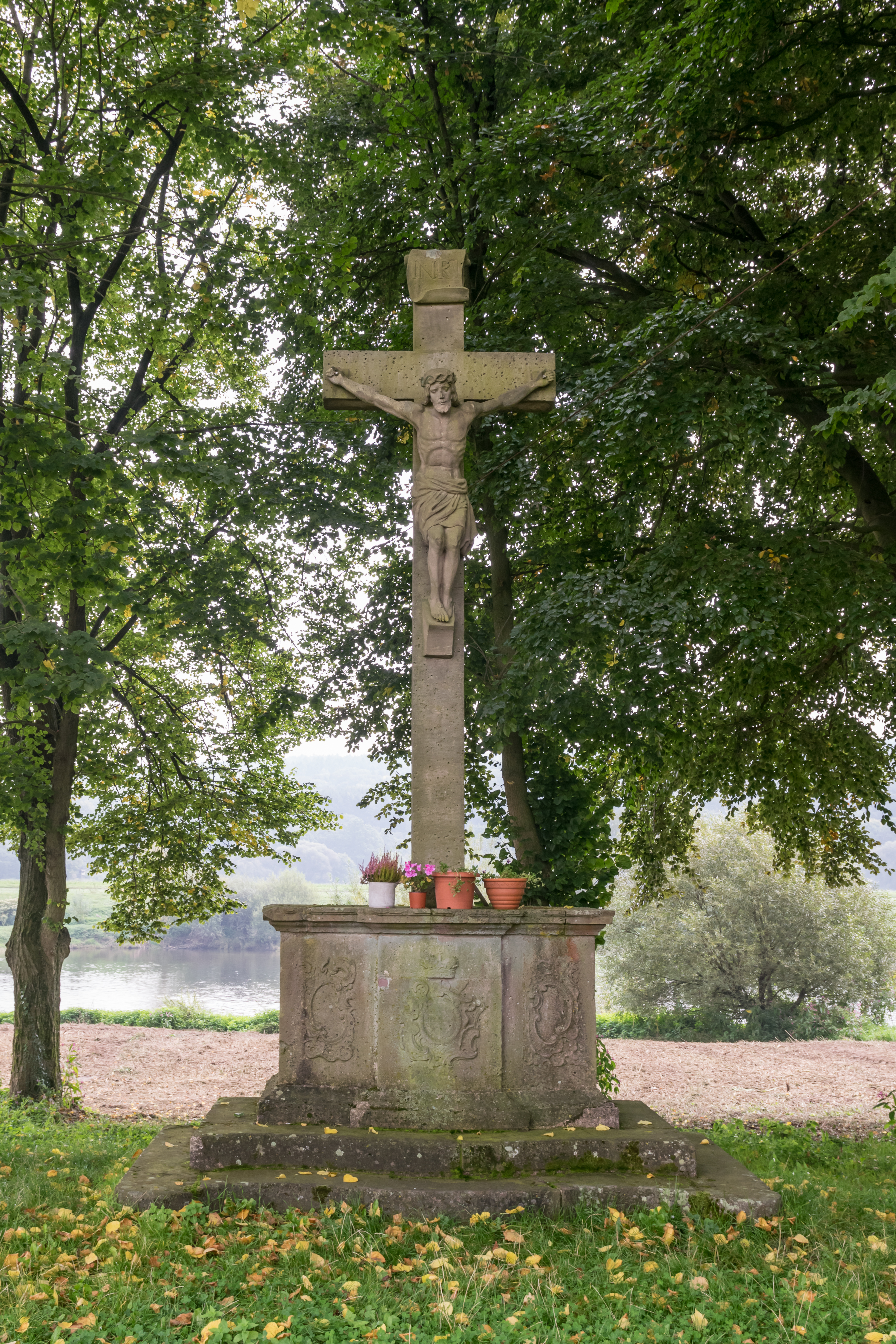 das Dreizehnlinden-Kreuz bei Corvey